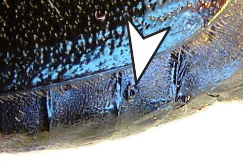 Stigma of Osmoderma eremita